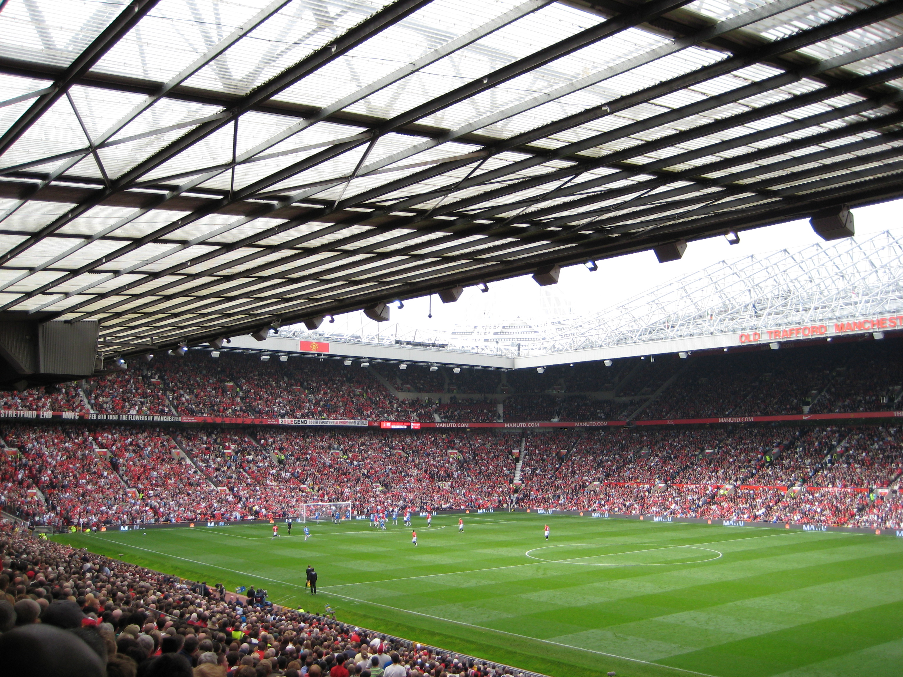 Old Trafford